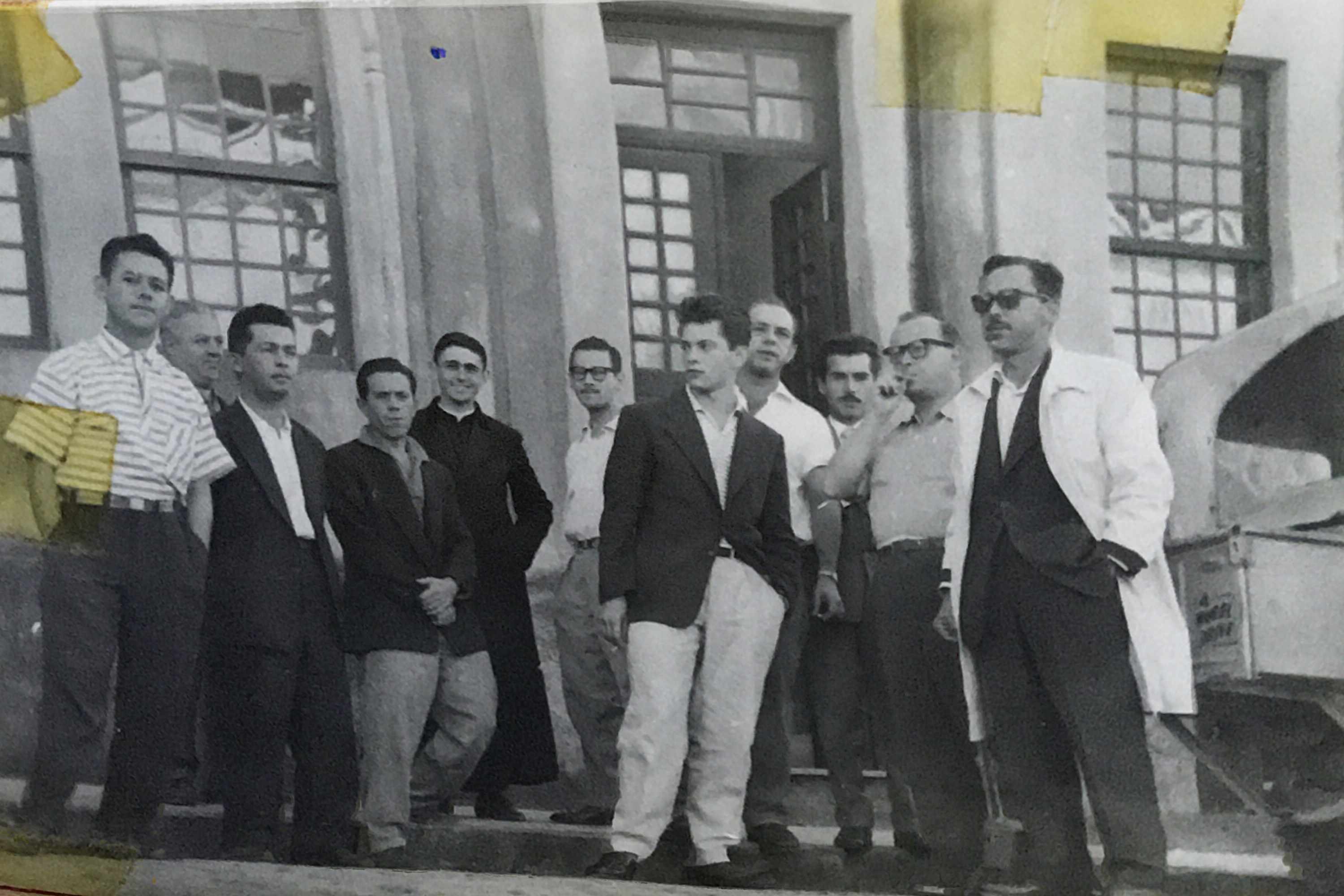 Todo os cinco desbravadores à direita da foto